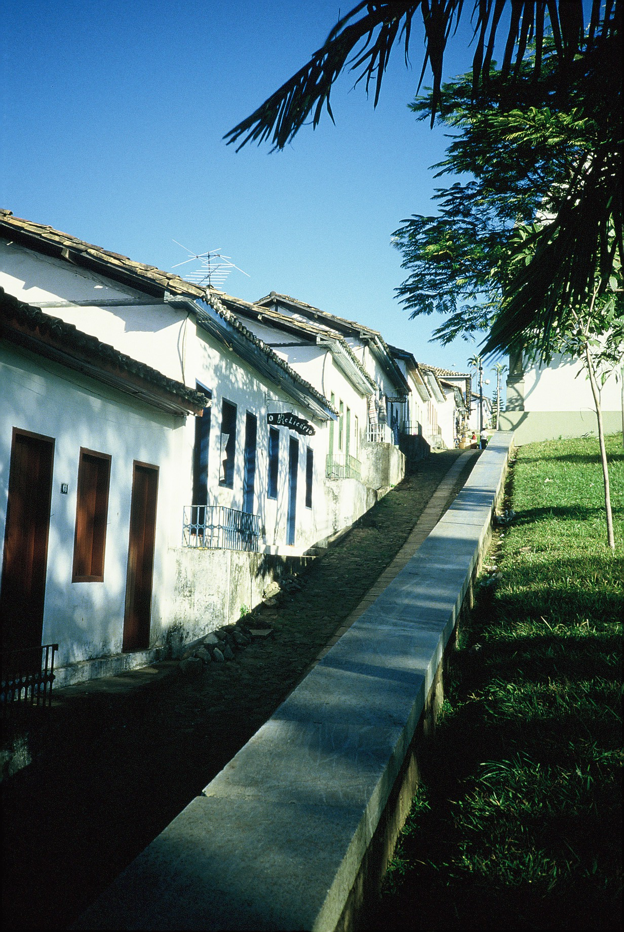 Congonhas, Minas Gerais, Brazil